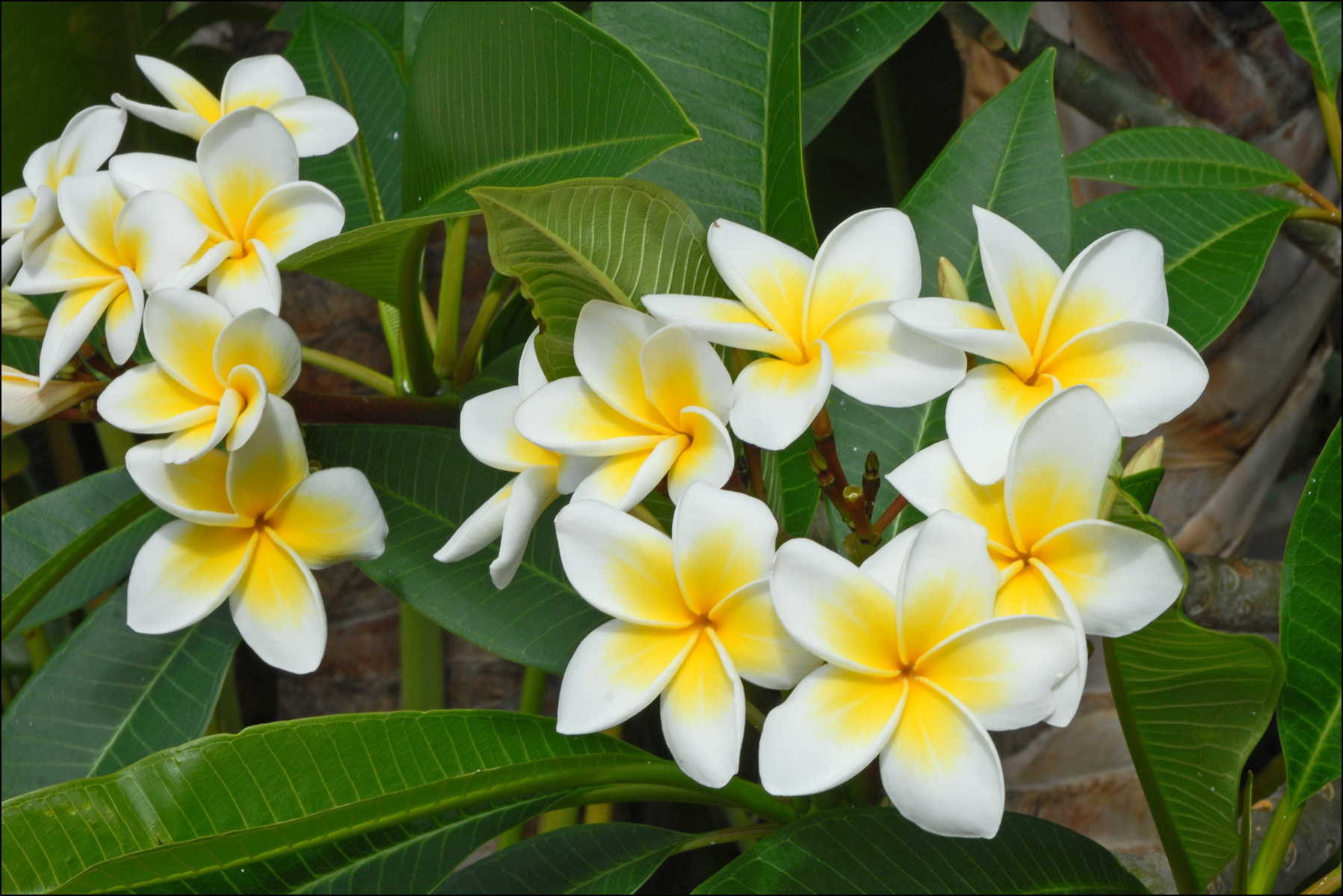 Le Frangipanier est un arbuste très fréquent sous les tropiques, il se rencontre partout sur l'ïle de la Réunion. Sa floraison est particulièrement belle et ses fleurs très odorantes.